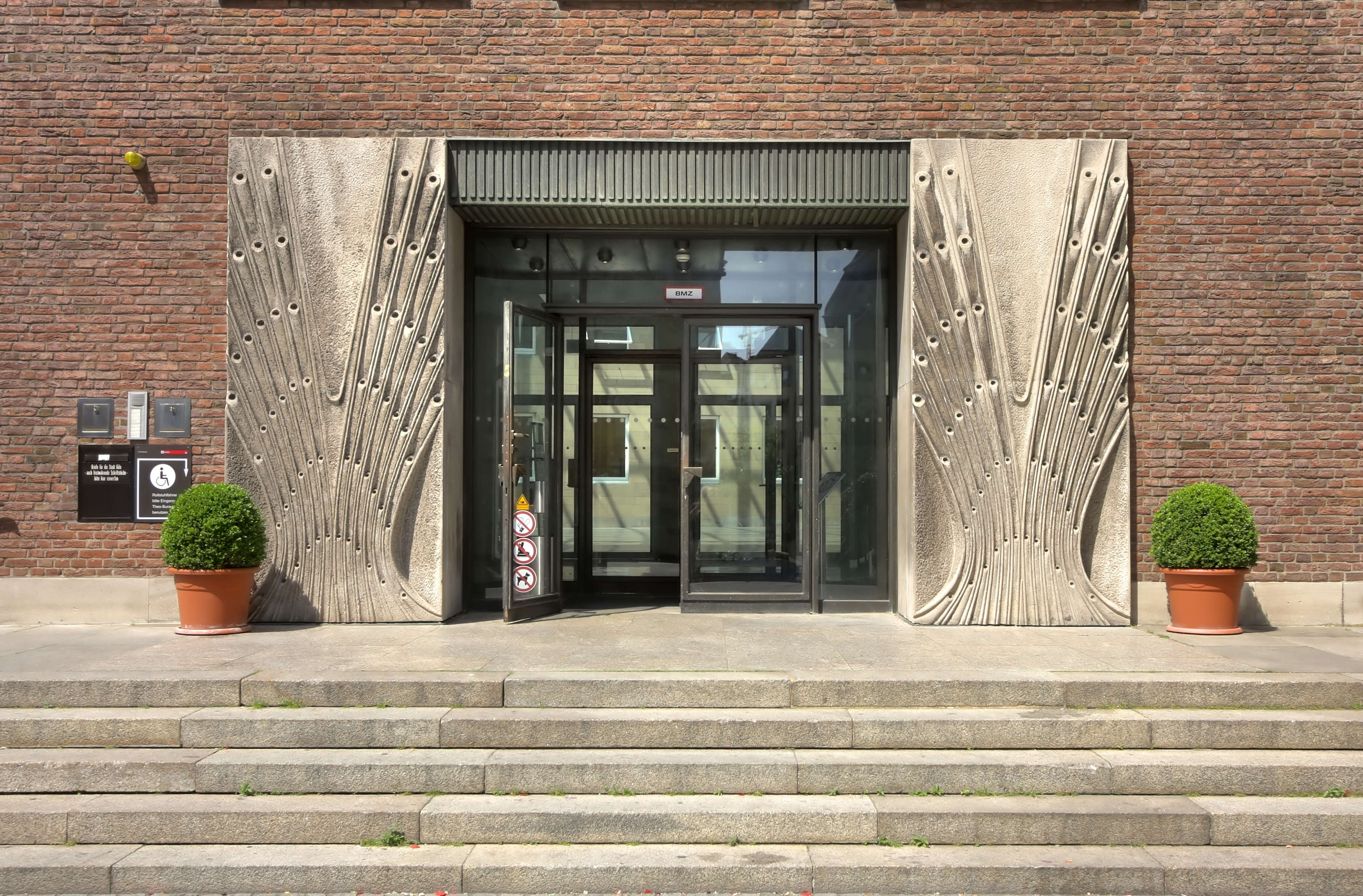 Kölner Rathaus. Eingang zum Spanischen Bau vom Rathausplatz aus. Portalgewände